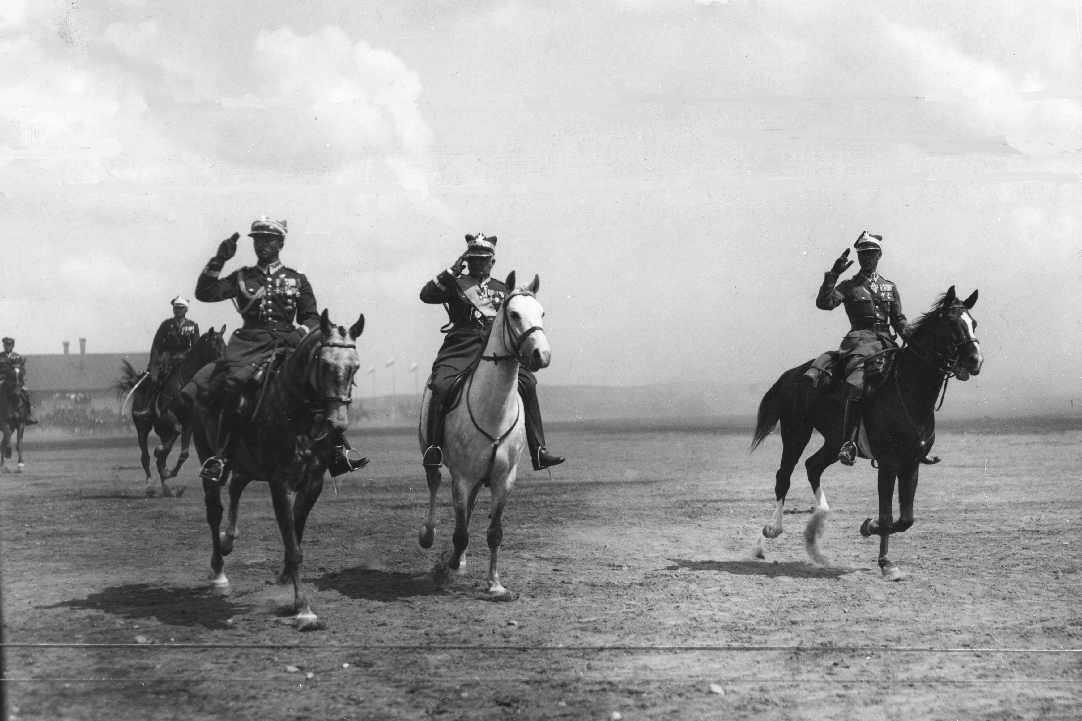 15-lecie 2 Pułku Ułanów Grochowskich w Suwałkach 25 lipca 1932. Defilada pułku z byłymi dowódcami na czele. Od lewej: gen. Stanisław Grzmot-Skotnicki, gen. Stefan Suszyński, płk Wincenty Jasiewicz. Koncern Ilustrowany Kurier Codzienny - Archiwum Ilustracji. Sygnatura: 1-W-1387-5